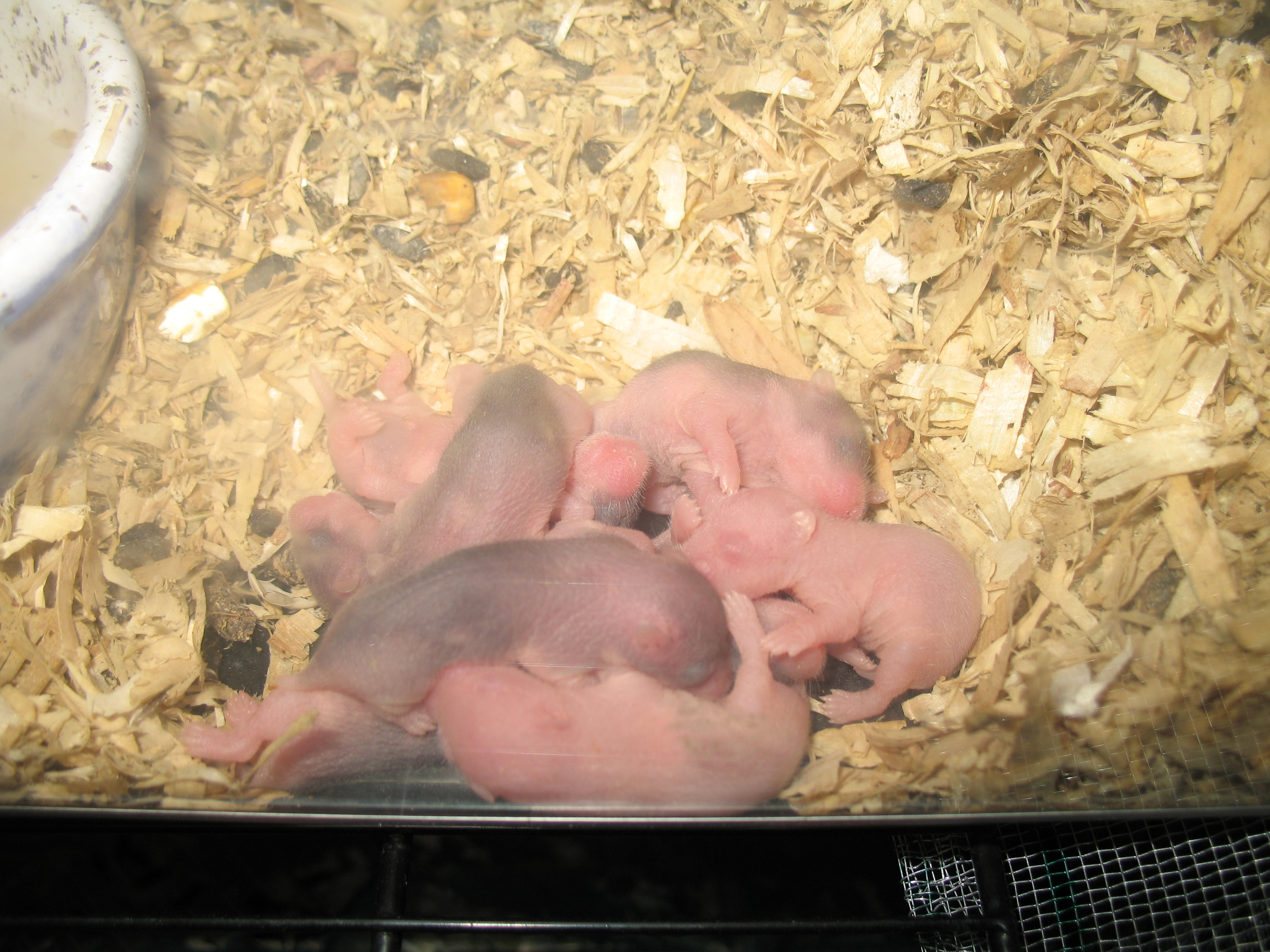 Une portée de bébés Hamsters.